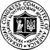 Лого УККА: Логотип